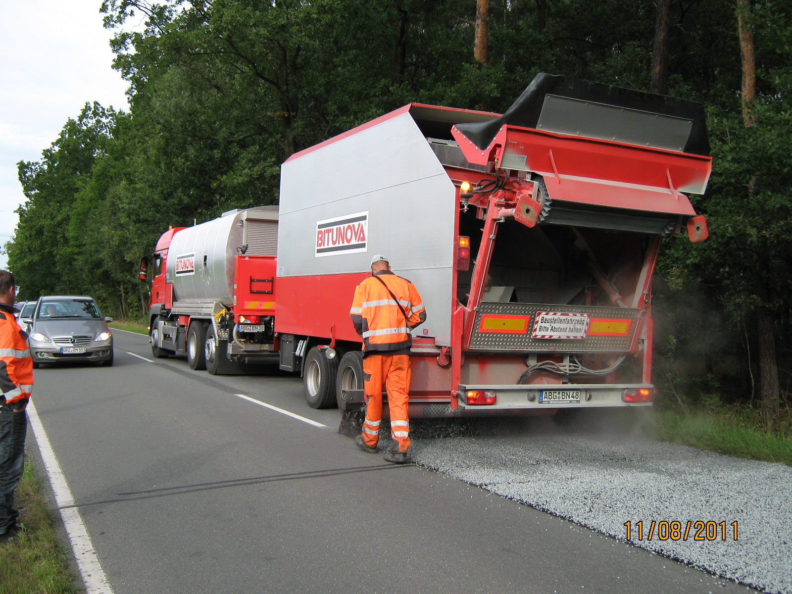 Oberflächenbehandlung